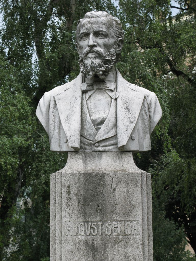 poprsje Augusta Šenoe na zagrebačkom Trgu Josipa Jurja Strossmayera - Bust of August Šenoa